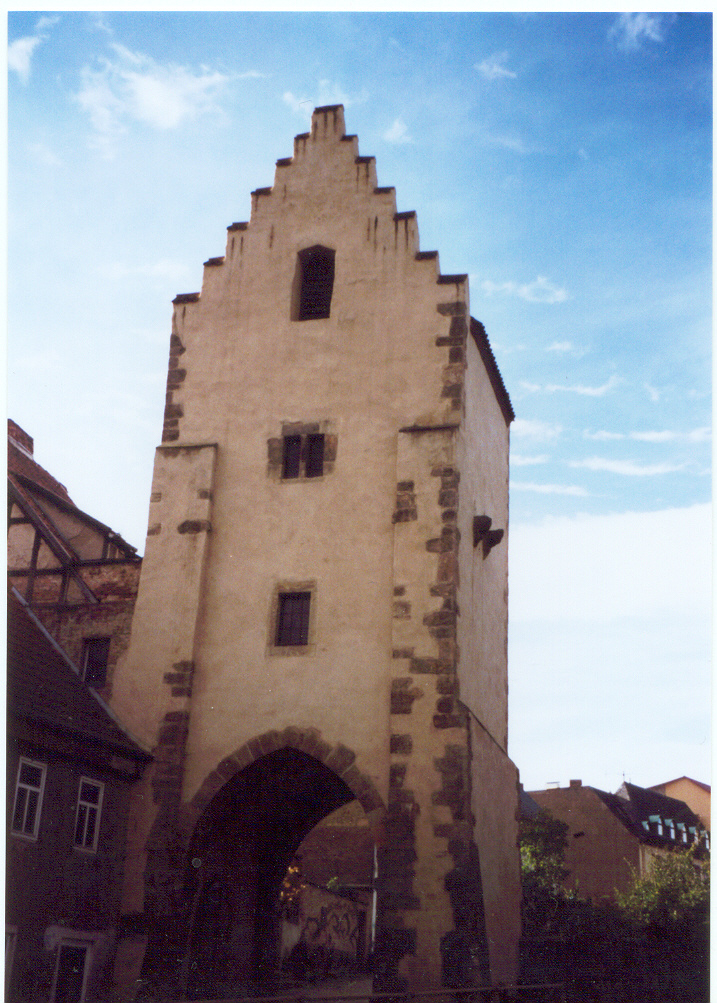 Das Saaltor in Saalfeld/Saale (Thüringen).